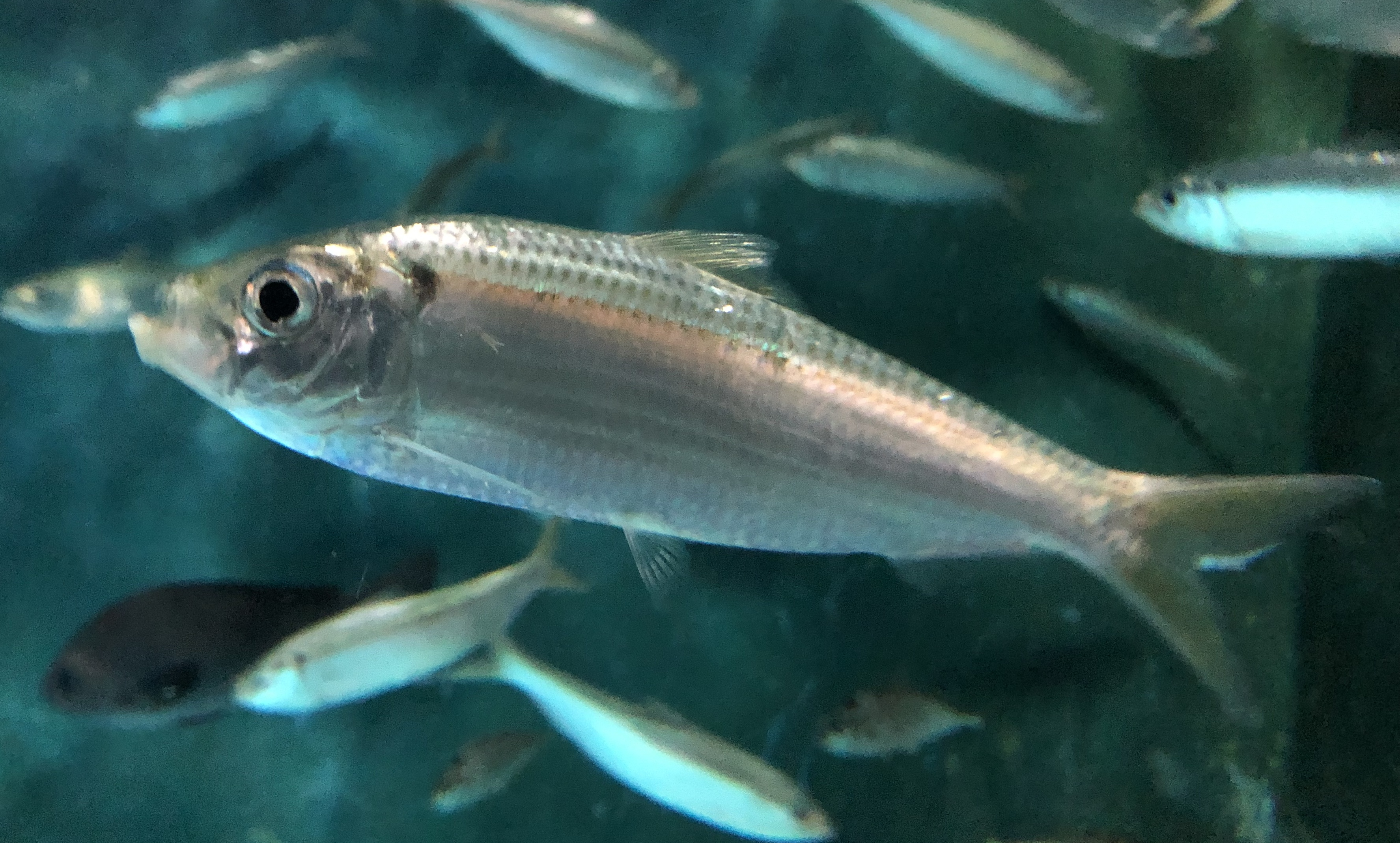 サッパ(Sardinella zunasi)。桂浜水族館飼育個体。